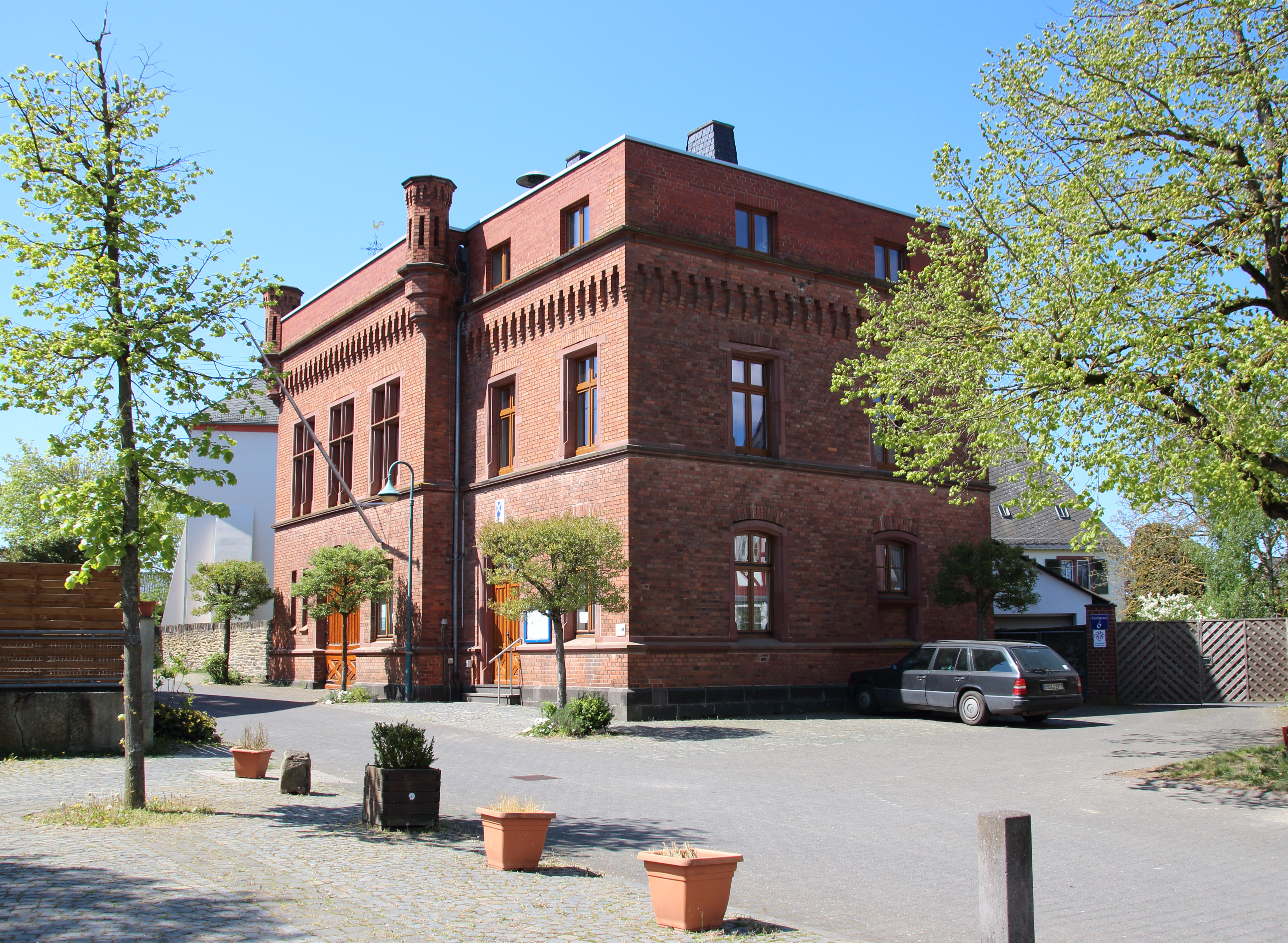 Rathaus von Weisel, Rhein-Lahn-Kreis. Erbaut 1878-1879 in rotem Backstein.